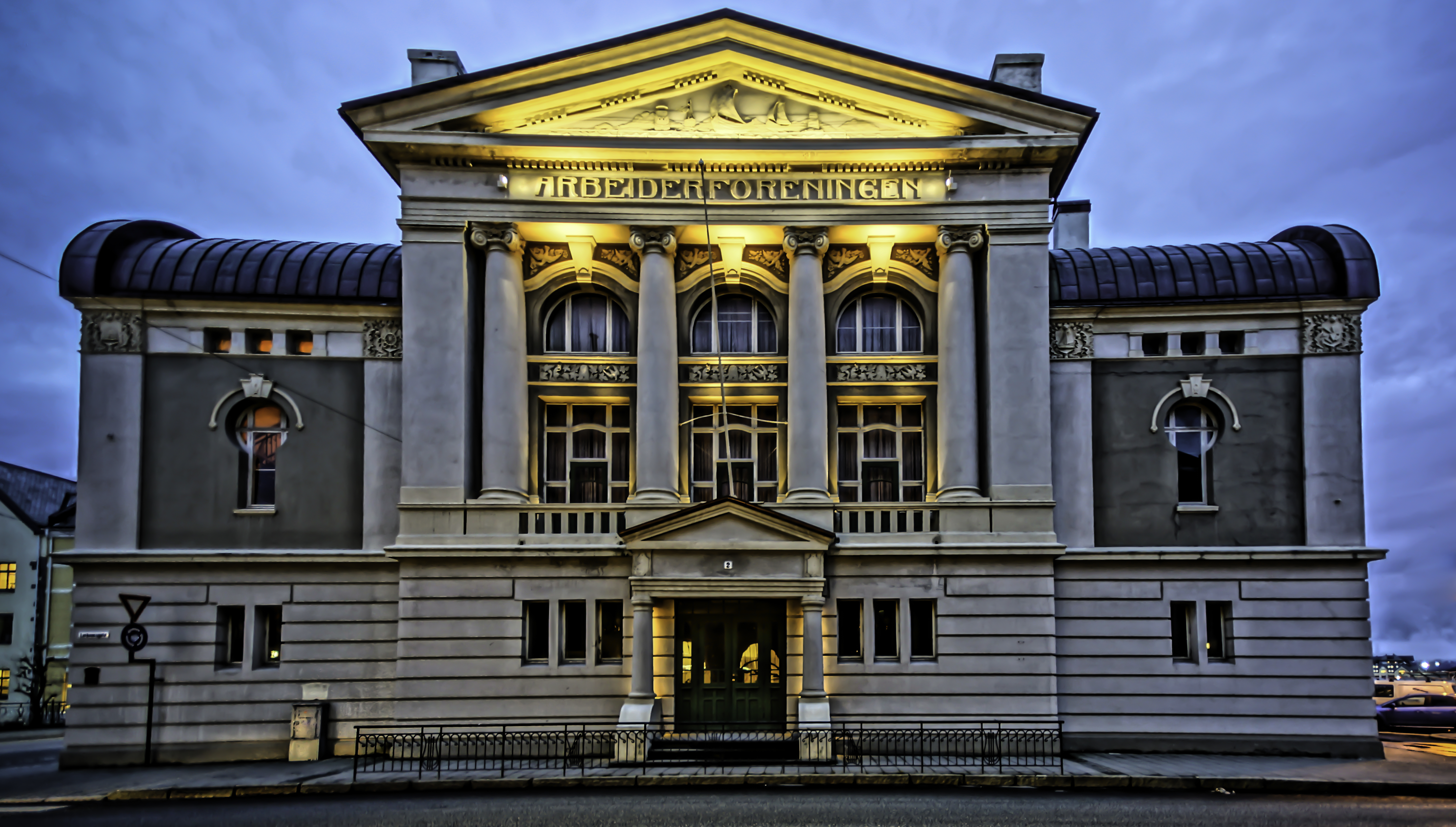 Arbeiderforeningens hus i Ålesund